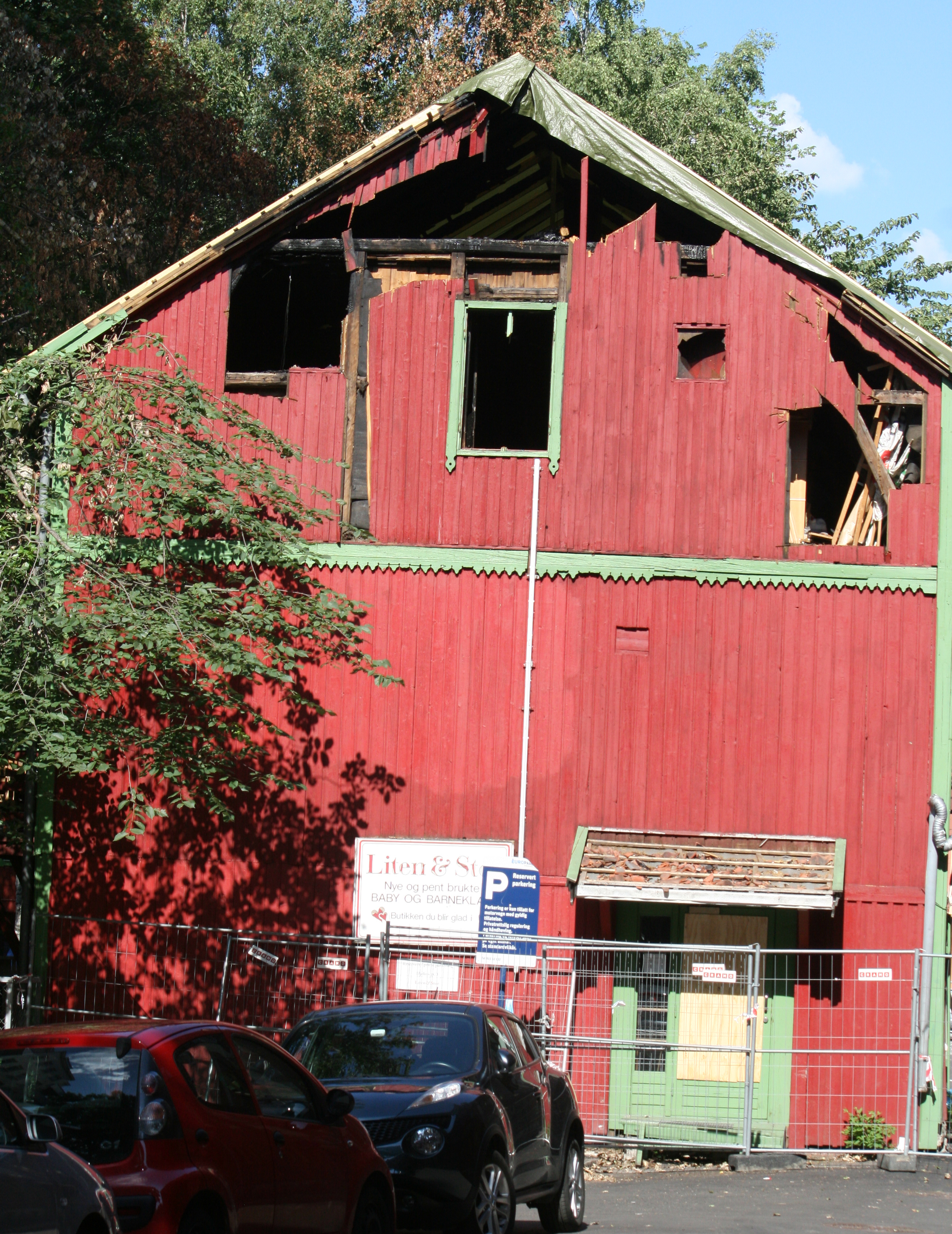 Hjelms gate 3 i Oslo etter brannen 26. juni 2014. Bygget er tidligere J. P. Hallén & Søn Garveri, i seinere år tilholdssted for diverse anarkistiske og frihetlige organisasjoner. Bygd 1858; arkitekt P. Galterud.